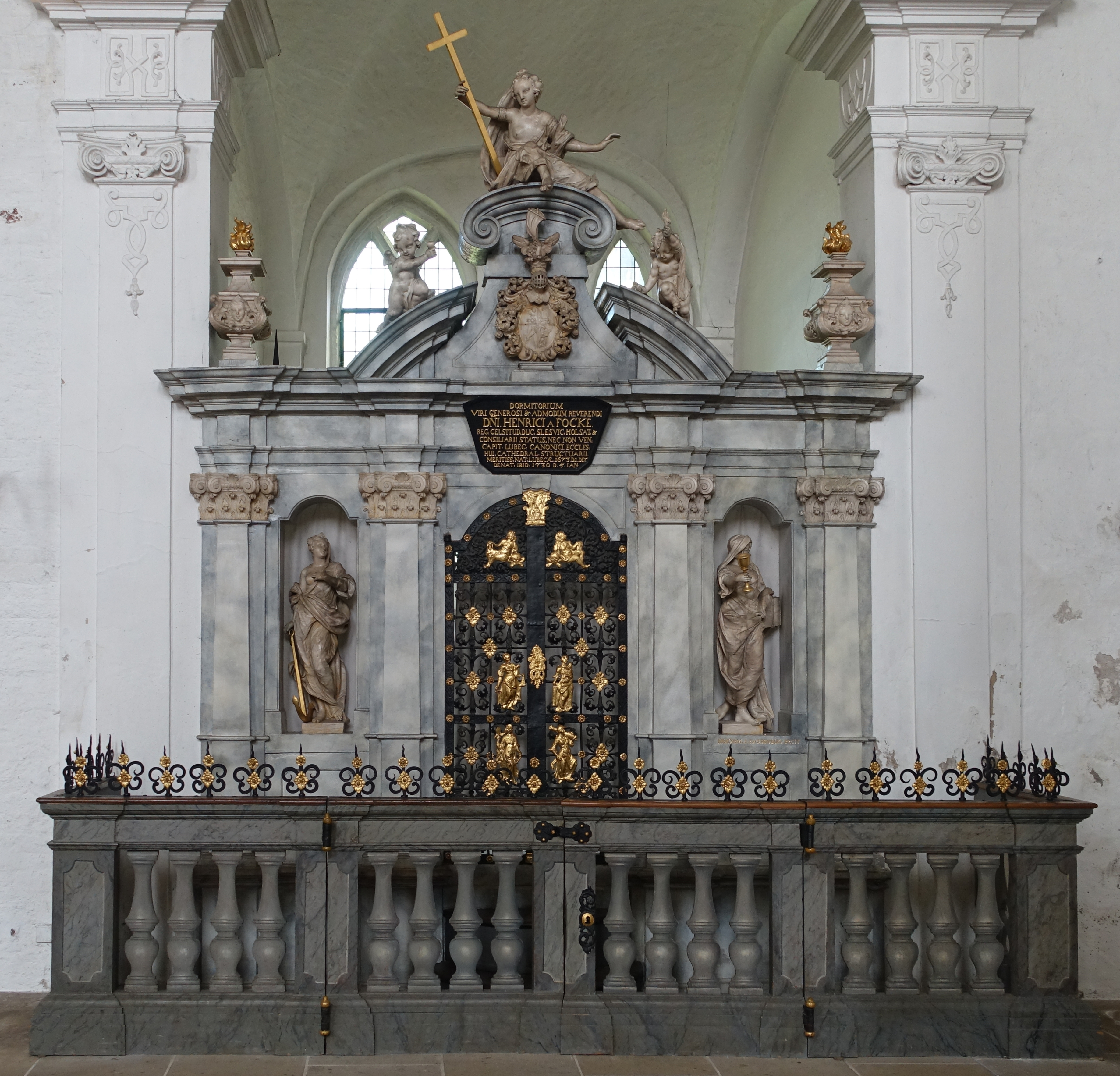 Focke-Kapelle im Lübecker Dom